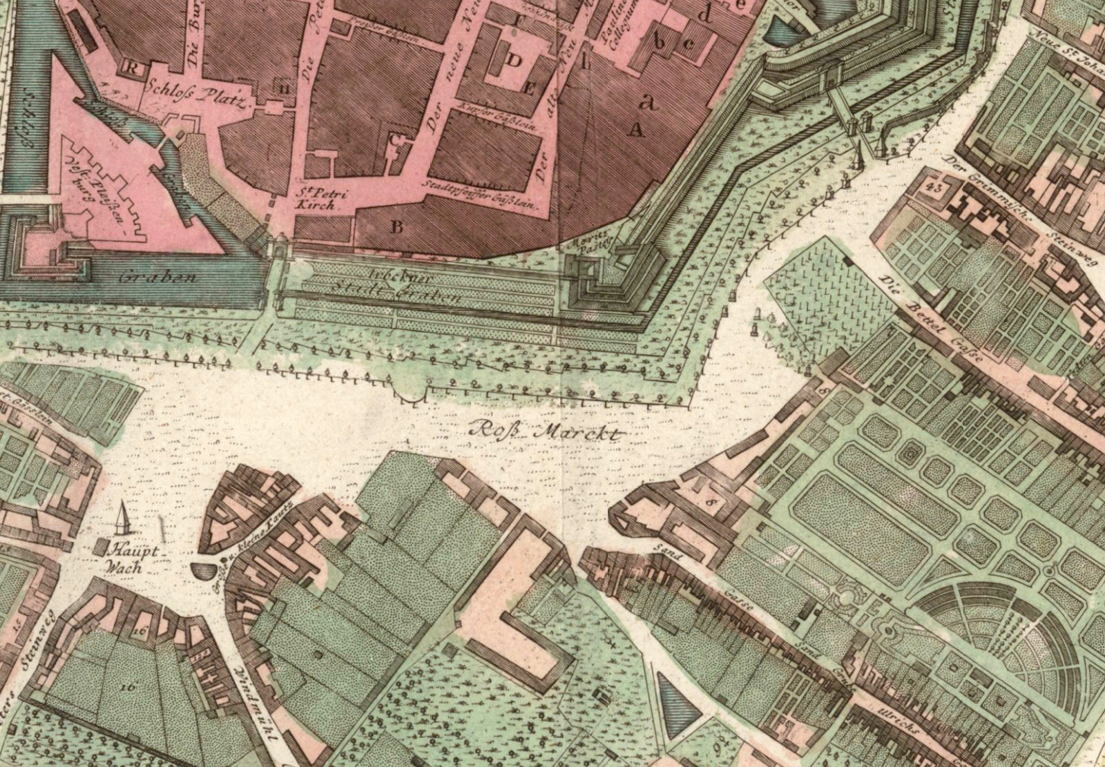 Umgebung Roßplatz auf einem Grundriss der Stadt Leipzig (Ausschnitt), kolorierter Kupferstich